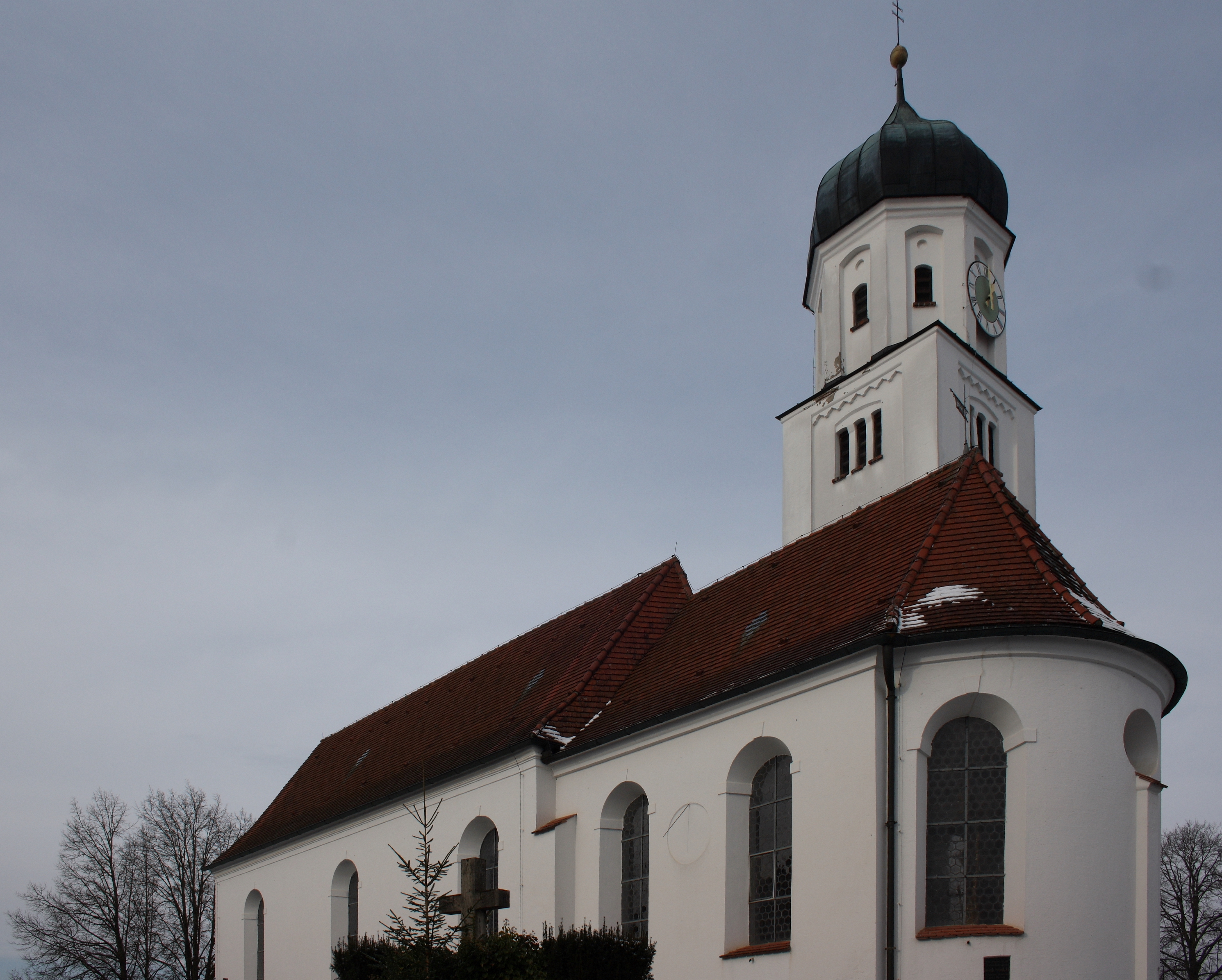 Katholische Pfarrkirche St. Leonhard in Baiershofen, einem Ortsteil der Gemeinde Altenmünster im Landkreis Augsburg (Bayern)